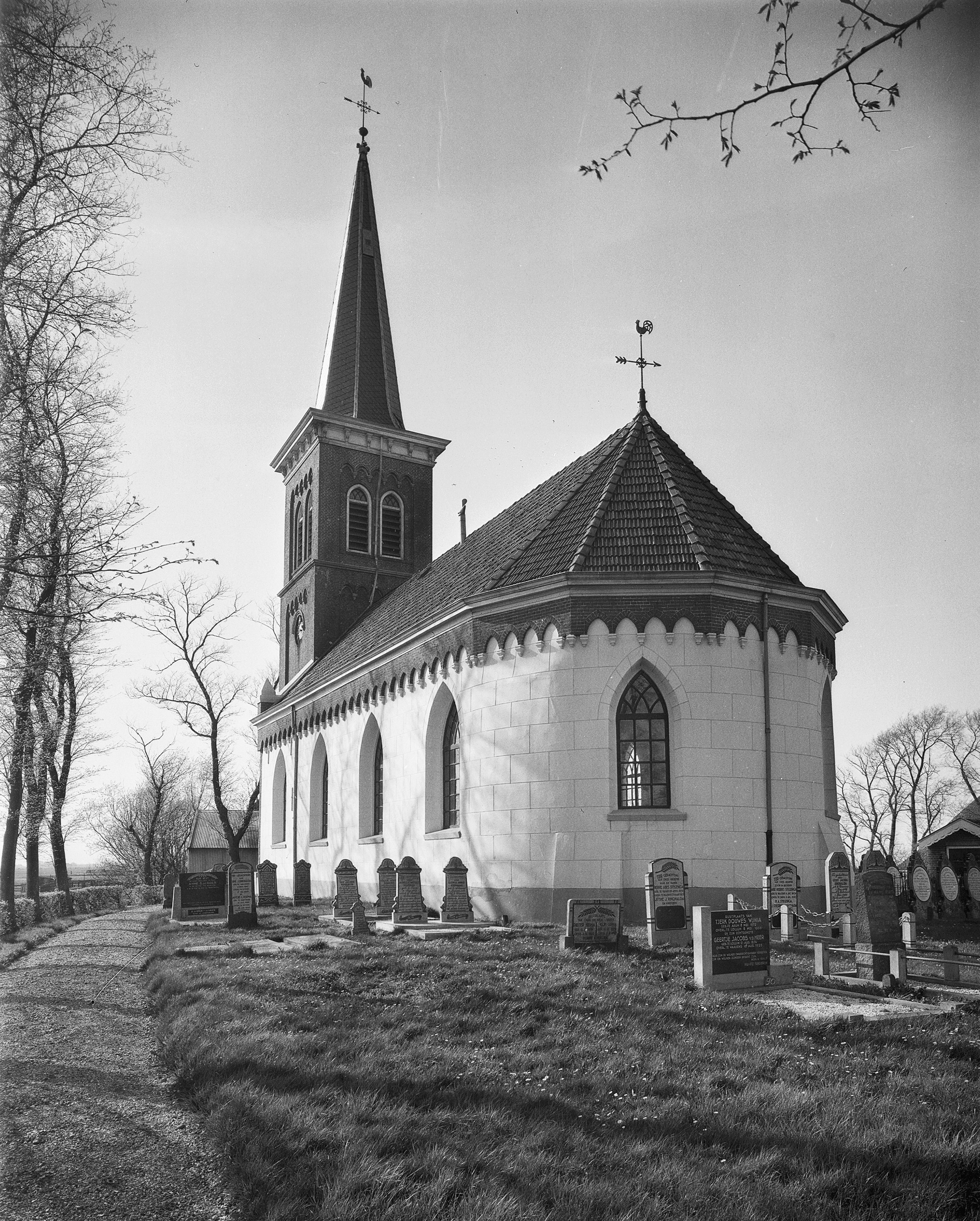 Nederlands Hervormde Kerk: kerk